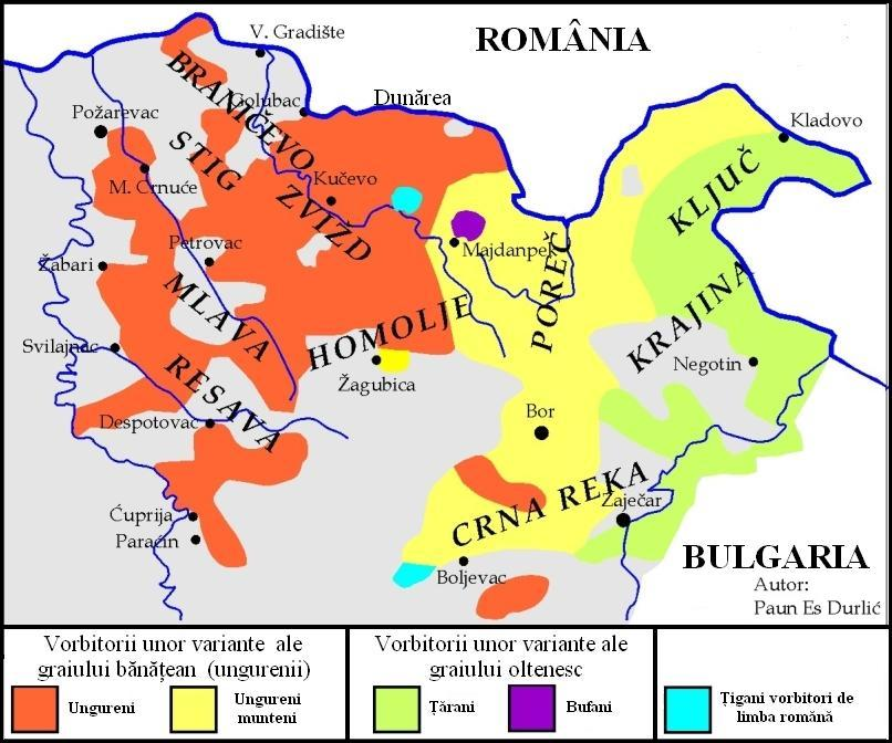 Imaginea a fost preluată de aici și tradusă.